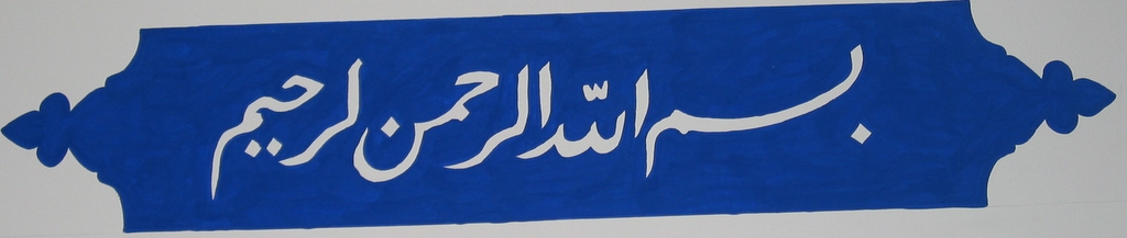 ali bey camii